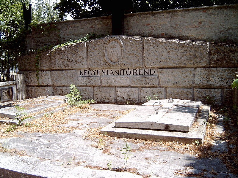 Sík Sándor (Bp., 1889. jan. 20. – Bp., 1963. szept. 28.): piarista rendi szerzetes, költő, műfordító, irodalomtörténeti, egyházi író, egyetemi tanár sírja a Kerepesi úti temető Piaristák nyughelyéül szolgáló sírboltban. Kerepesi temető: J. 511.